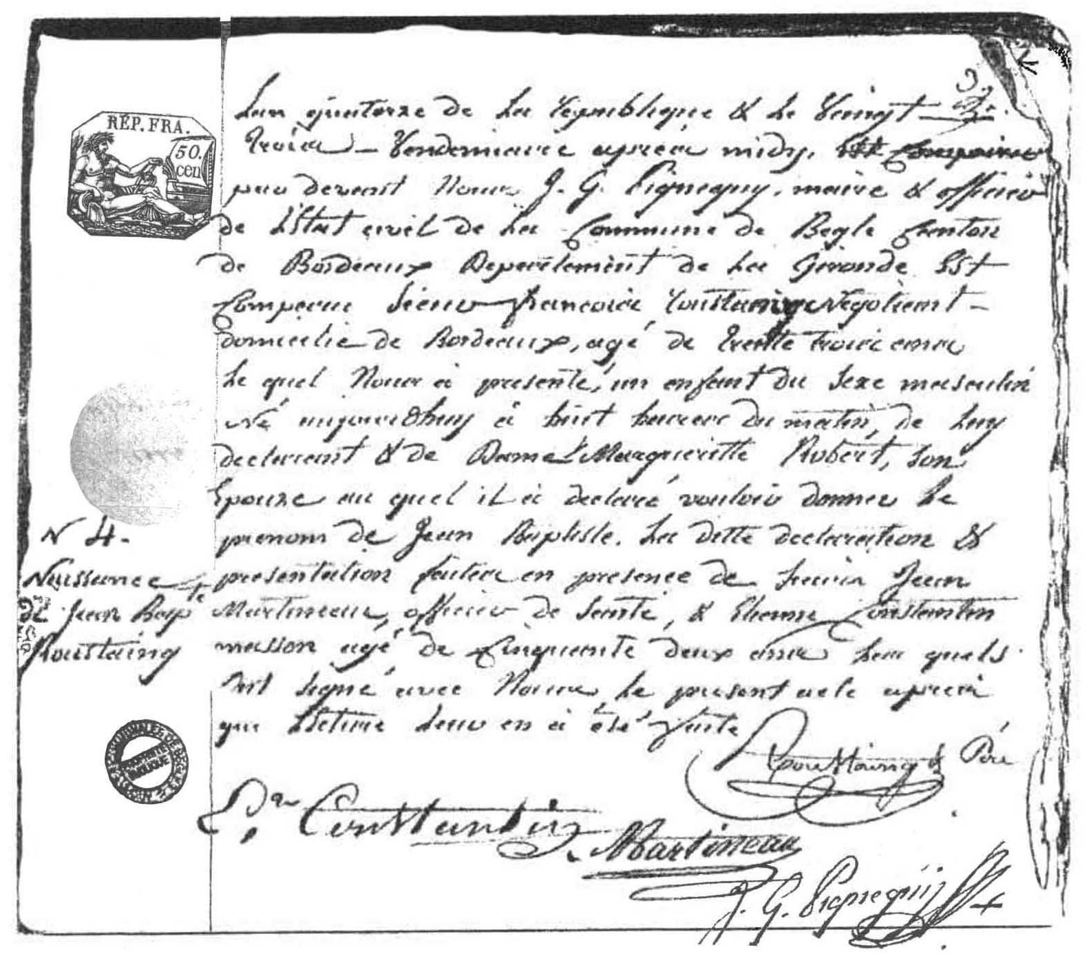 Fac-símile do registro de nascimento de Jean-Baptiste Roustaing, no ano catorze da República e vinte e três do Vindemiário (15 de outubro de 1805), em Bègles, cantão de Bordeaux, departamento da Gironde, França.